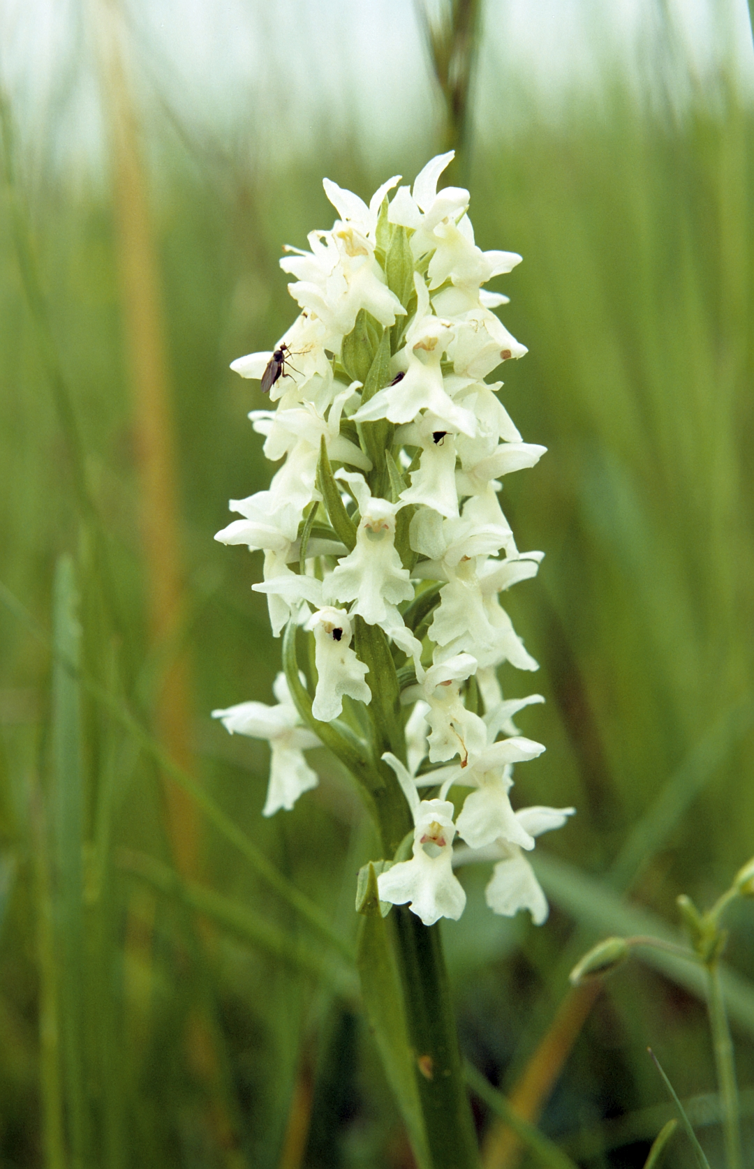 Breitblättriges Knabenkraut (Dactylorhiza majalis lusus albiflora), Ittersbach, 16.05.2001